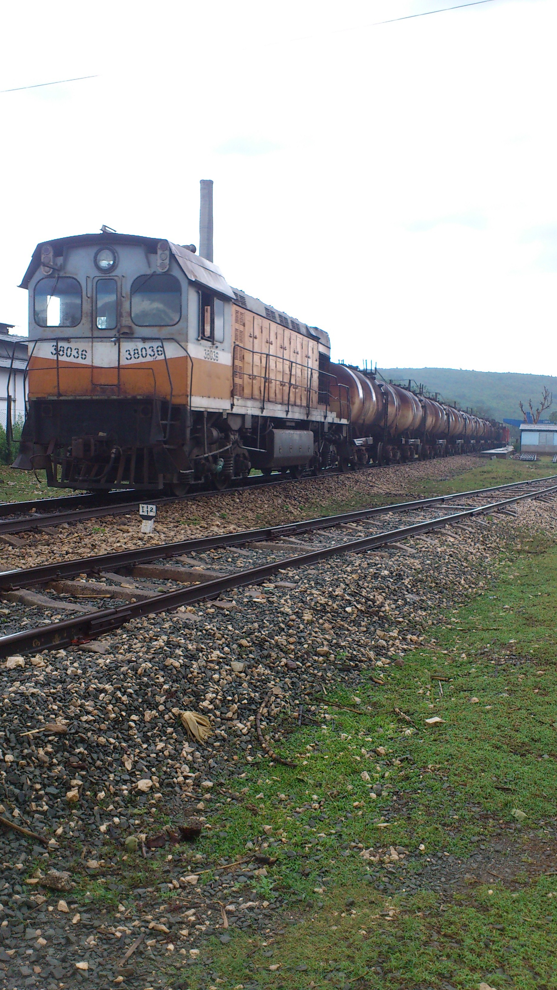 Costa Rica, Cuba